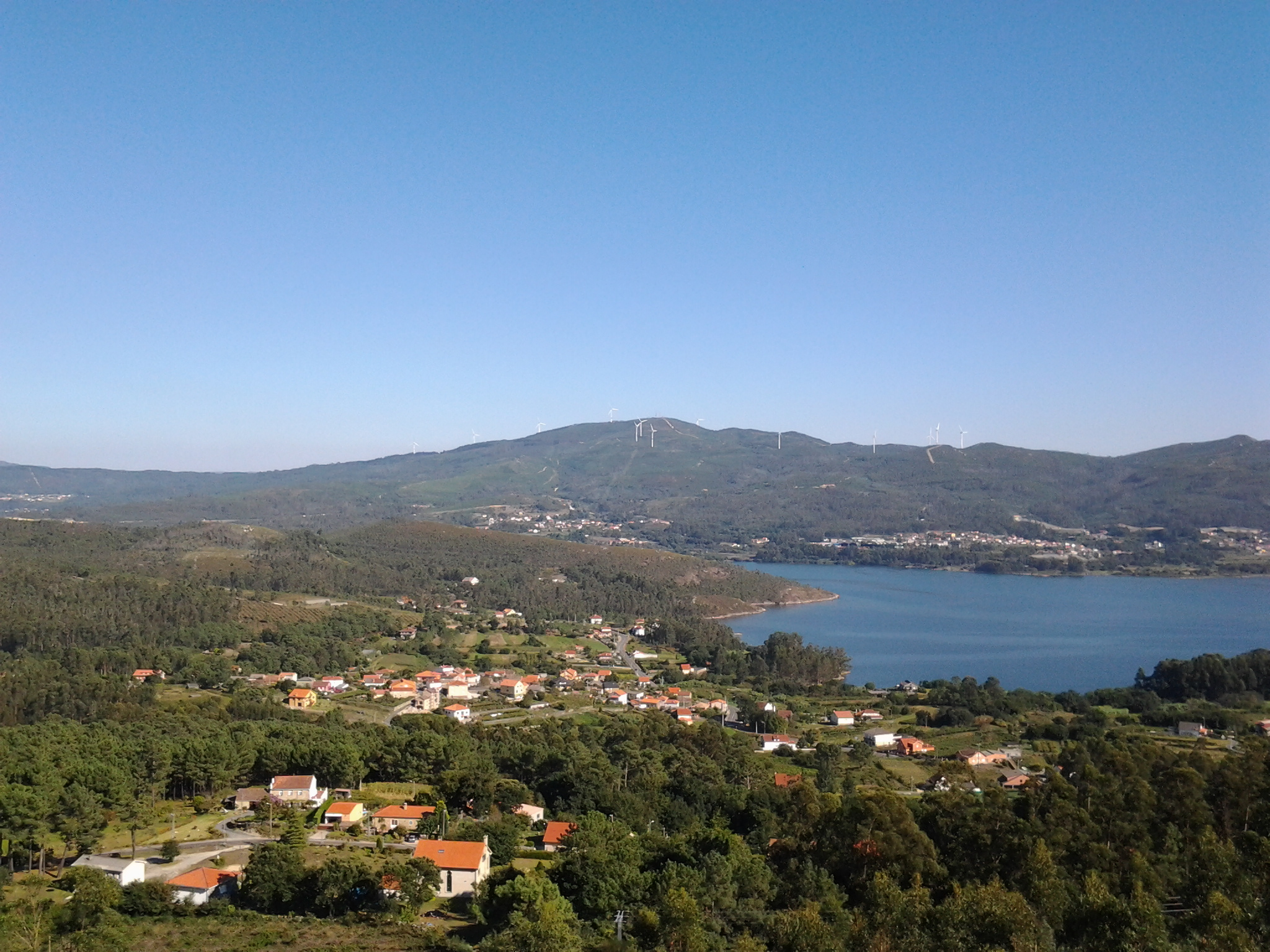 Vista da parroquia de Leiro, en Rianxo, dende o Monte da Pena.